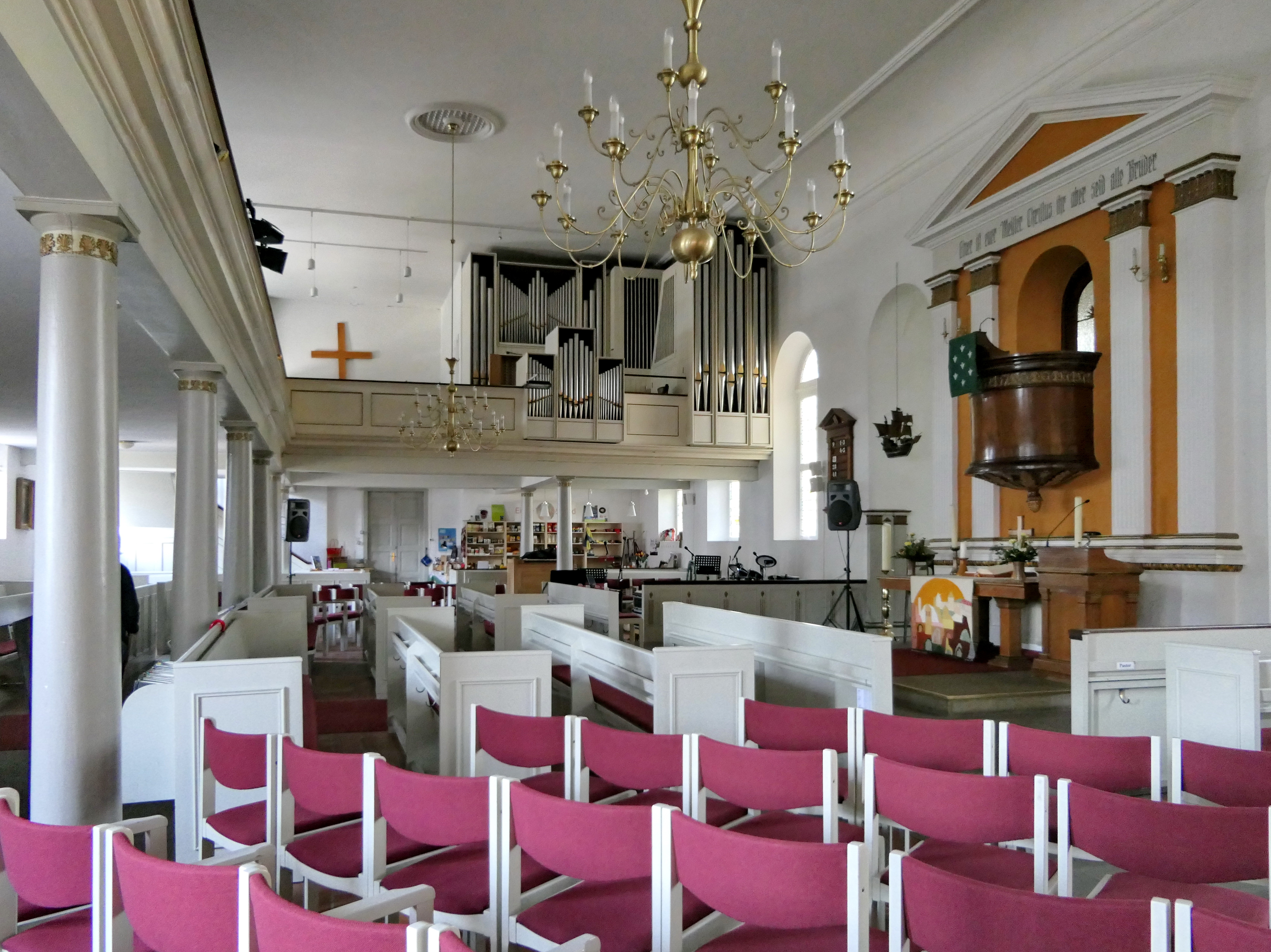 Stadtkirche Vegesack der Vereinigten Evangelisch-Protestantischen Kirchengemeinde zu Bremen-Vegesack, Innenansicht 2018